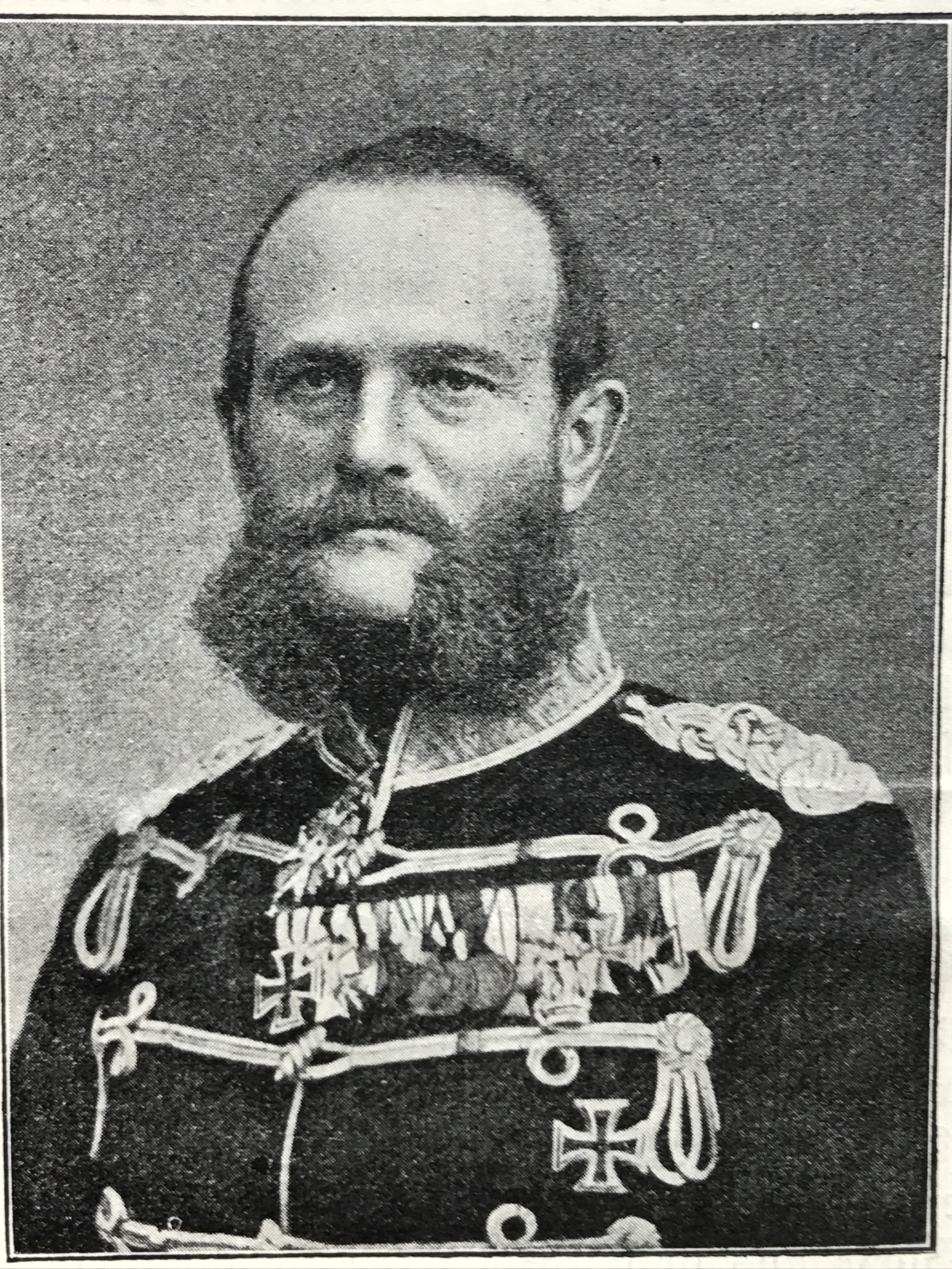 Friedrich von Rauch (Generalleutnant) 1829-1907, Abb. aus dem Magazin für Braunschweigische Geschichte